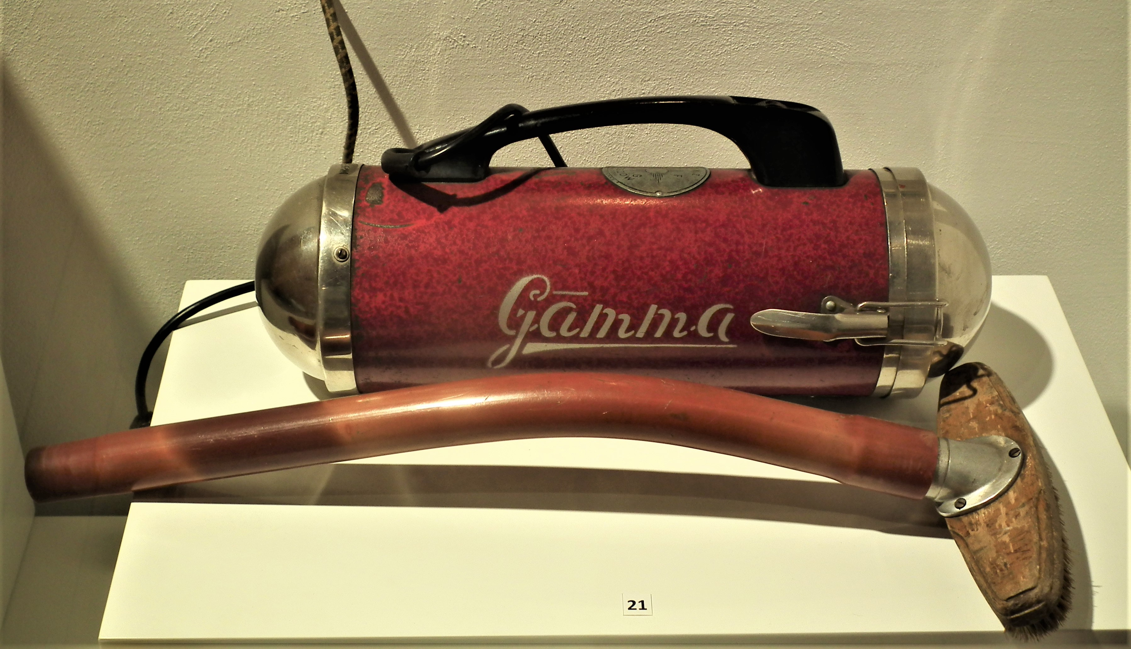 Odkurzacz Gamma w Muzeum Miasta Włocławka.